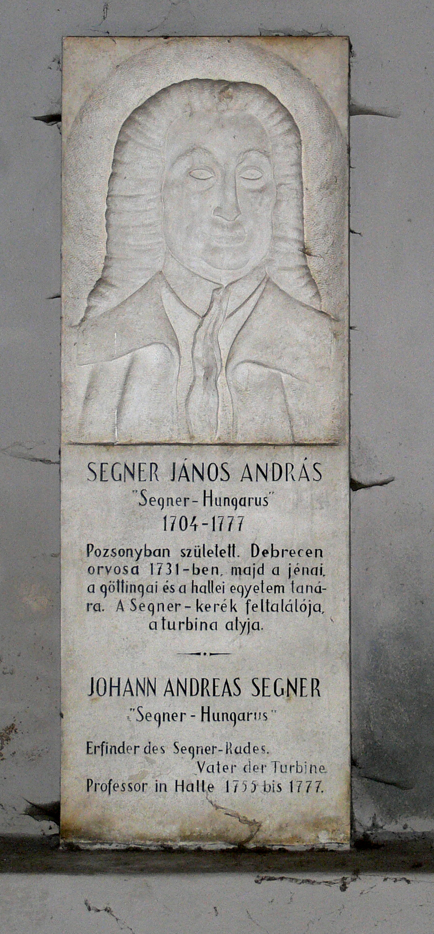 Stadtgottesacker, Halle an der Saale. Grab Johann Andreas von Segner.